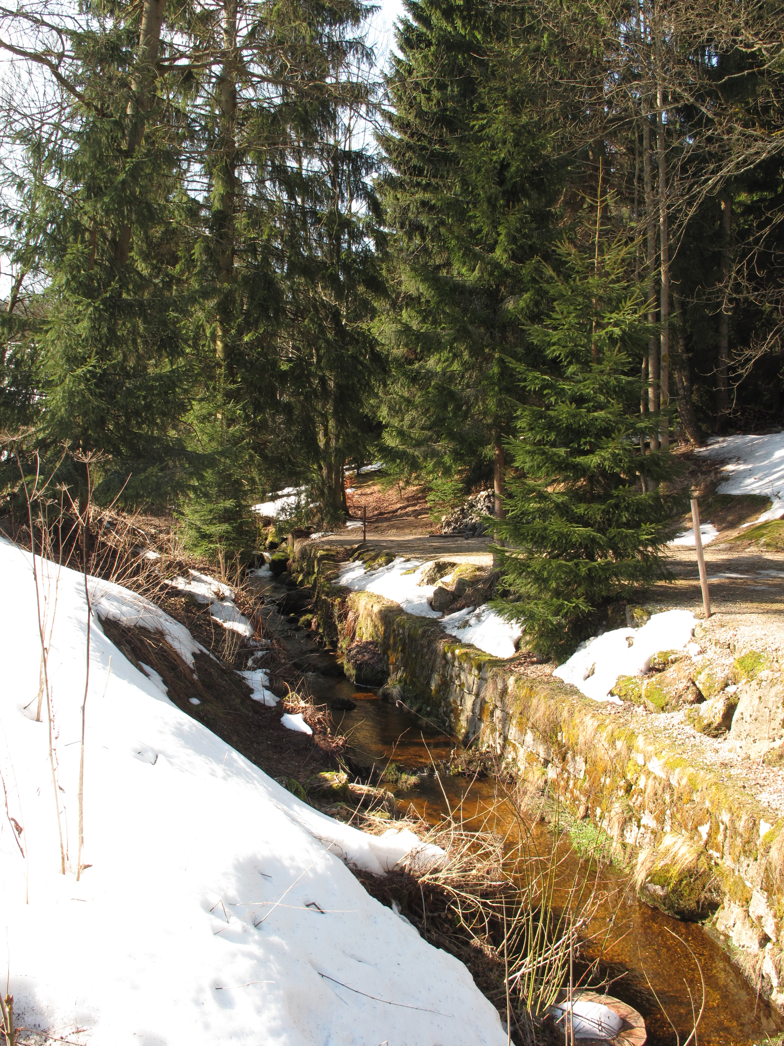 Potok v Karlově. Okres Jablonec nad Nisou, Česká republika.